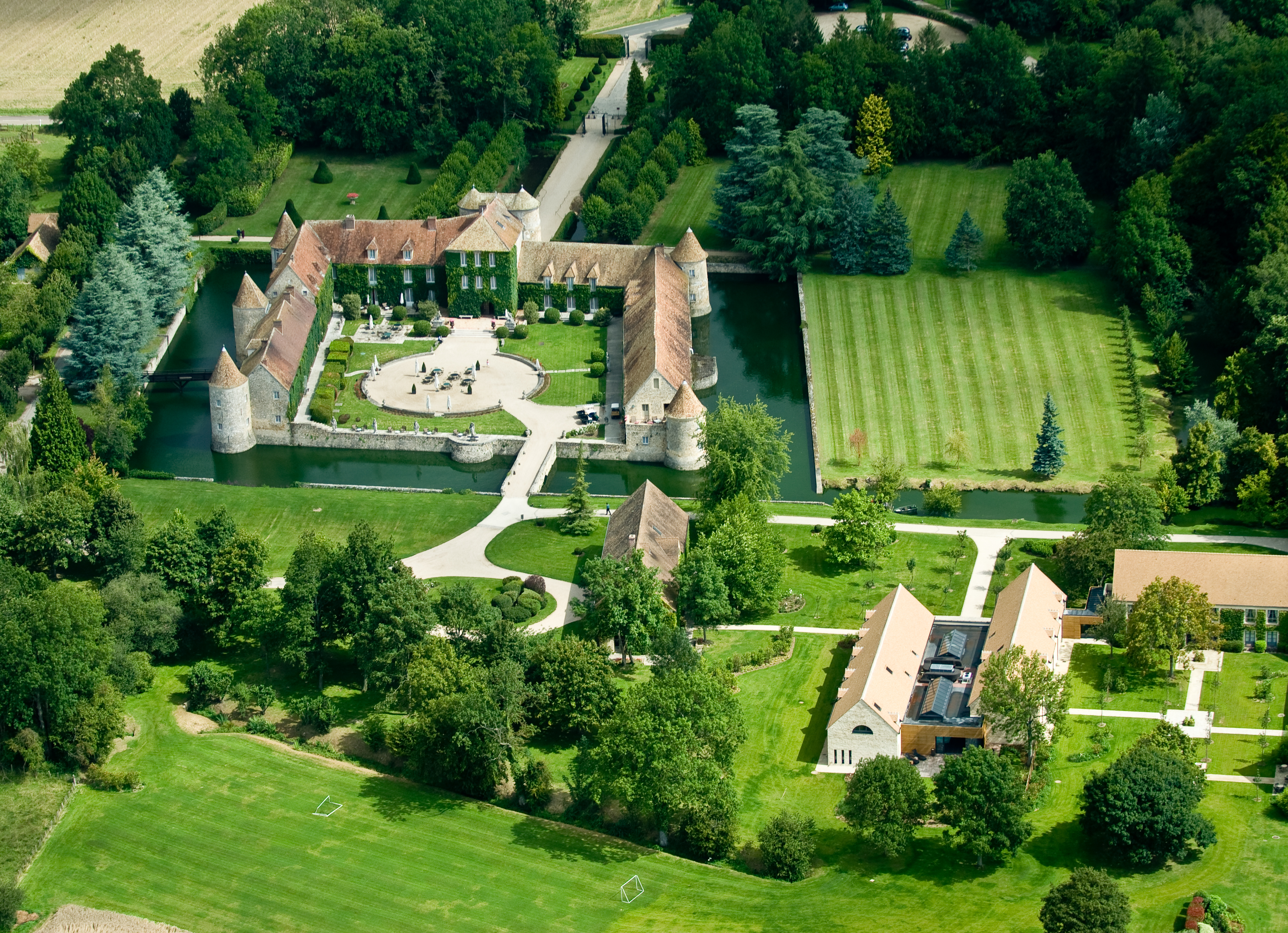 Vue aérienne du Château de Villiers-le-Mahieu